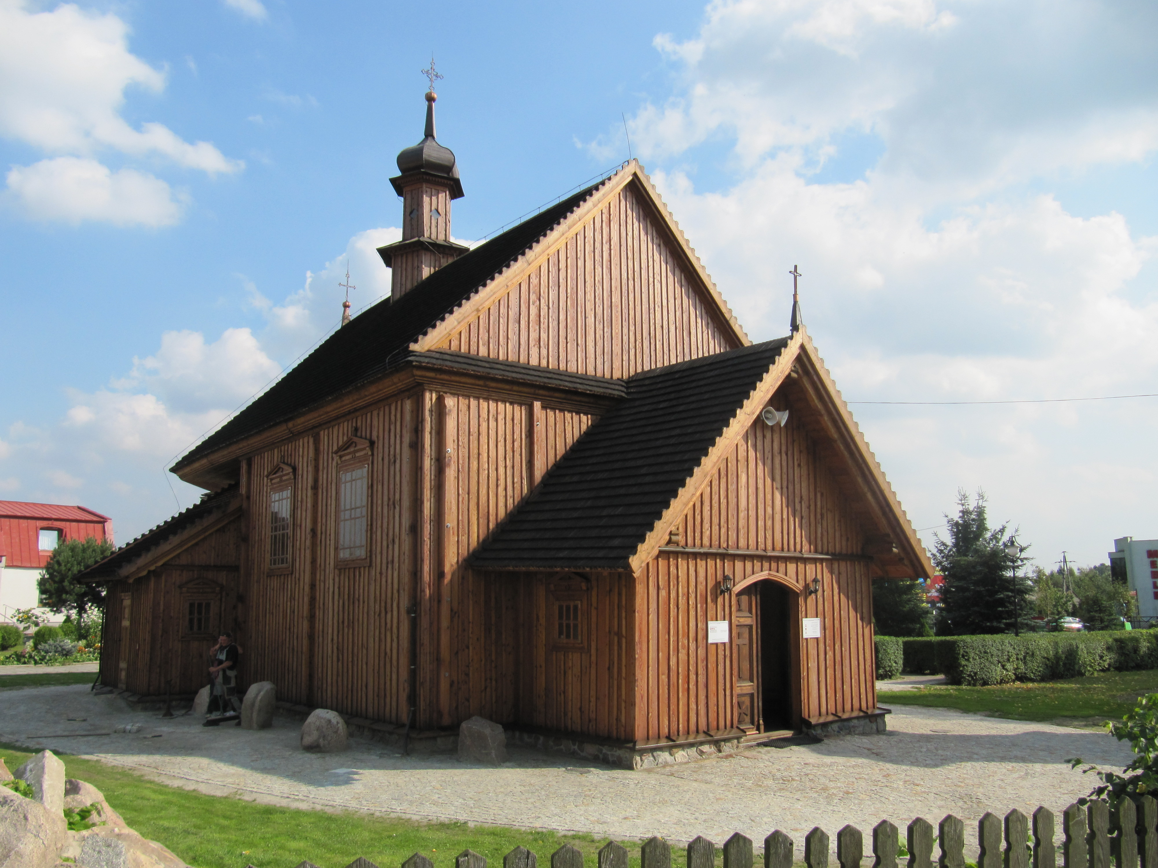 Radomsko - Kościół par. pw. św. Rocha, drewn., 1502, XVIII - widok od frontu (zabytek nr 230-X-40 z 29.03.1949; 242 z 27.12.1967)